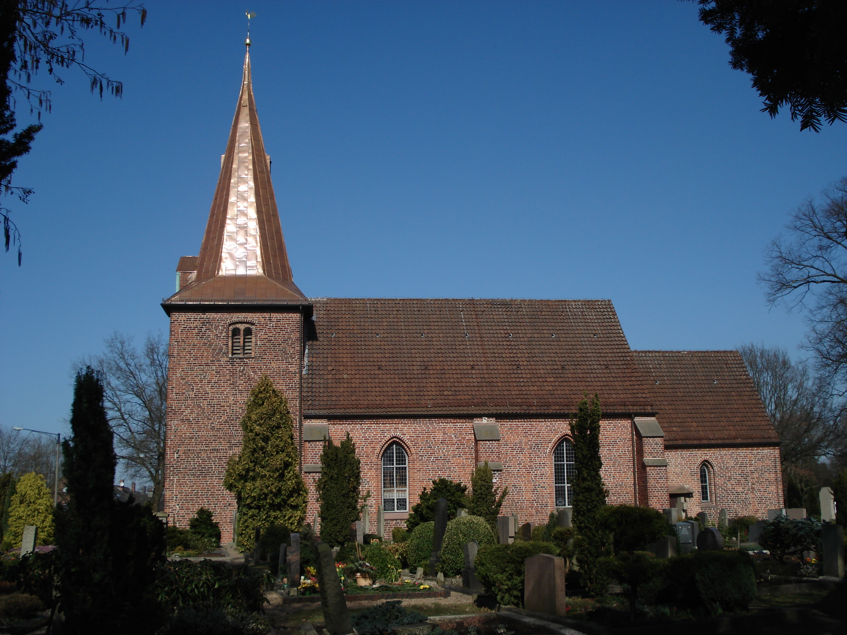 St. Johannes (Arsten) in Bremen, Arster Landstraße 51Das abgebildete Objekt ist ein geschütztes Kulturdenkmal in der Freien Hansestadt Bremen, mit der Nr. 0093 beim Landesamt für Denkmalpflege registriert.